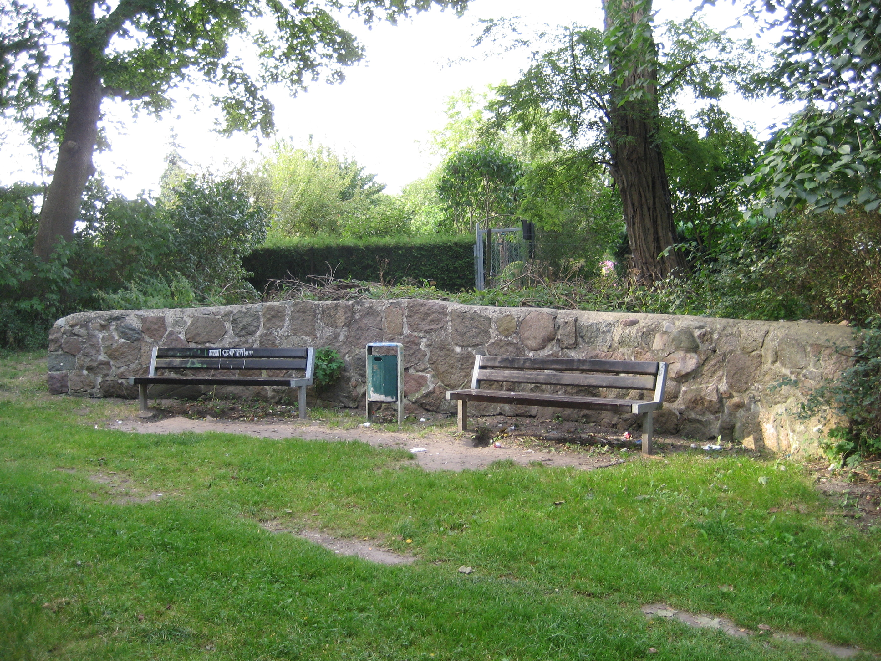 Auf Initiative von Friedrich Ludwig von Mecklenburg (1821-1884), eines Offiziers des Kürassier-Regiments in Pasewalk, der sich sehr um die Grüngestaltung der Stadt verdient gemacht hat, wurde zwischen 1865 und 1867 an der Löcknitzer Chaussee eine der ersten Parkanlagen der Stadt als Promenade angelegt, der später so genannte Park "Mecklenburgs Ruhe". In Erinnerung an ihn und sein Wirken ließ die Stadt Pasewalk 1934 am östlichen Ende des Parks einen Feldstein - den "Mecklenburg-Stein"- als Denkmal errichten, mit der Inschrift: "Mecklenburg's Ruhe".